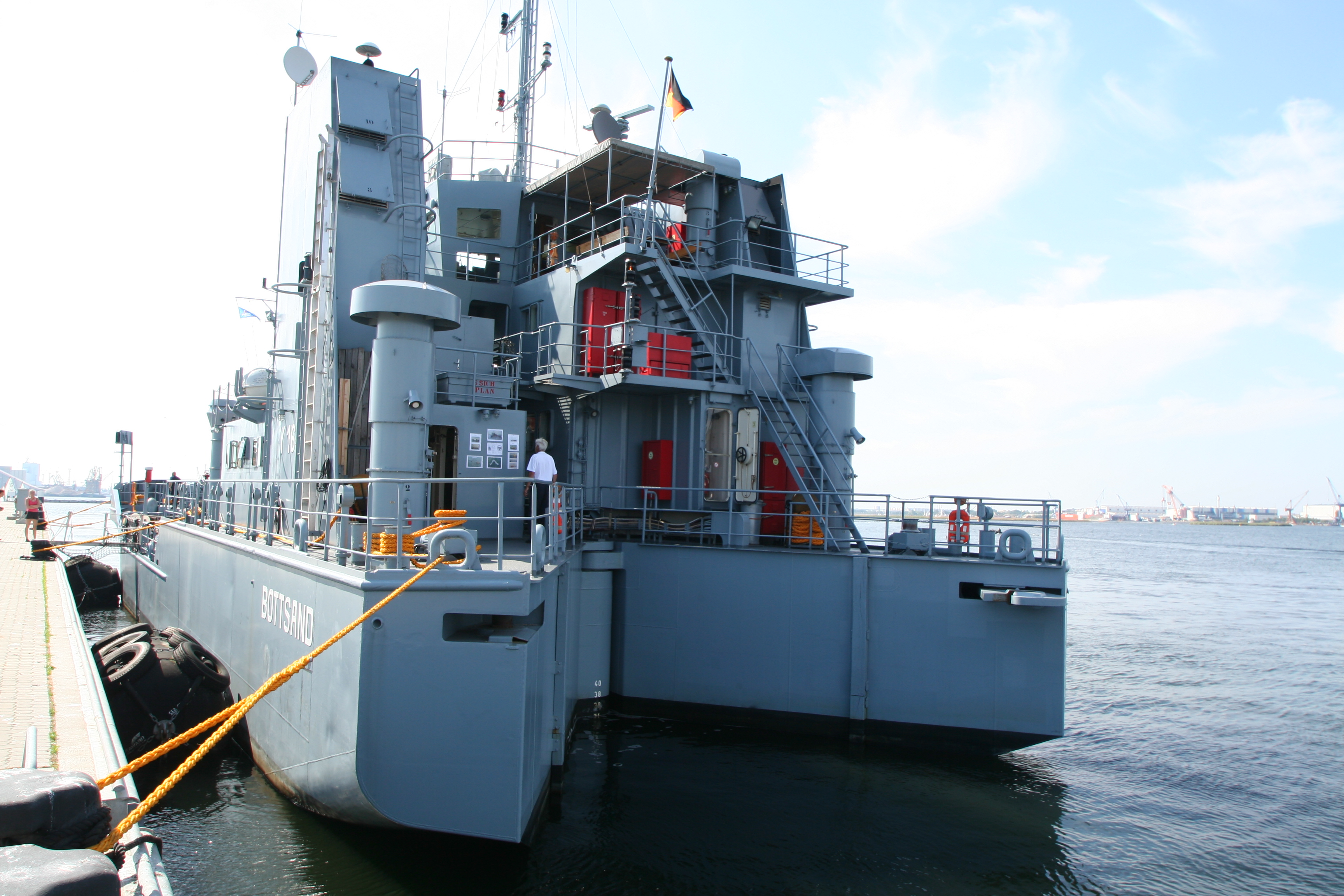 Ölauffangschiff Bottsand der Bottsand-Klasse.